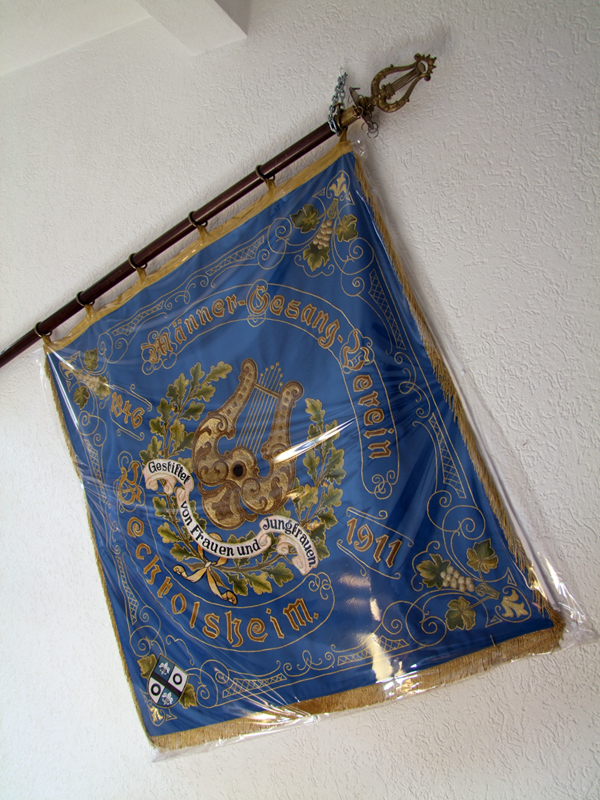 Fahne des Männer-Gesangs-Vereins 1846 von Bechtolsheim